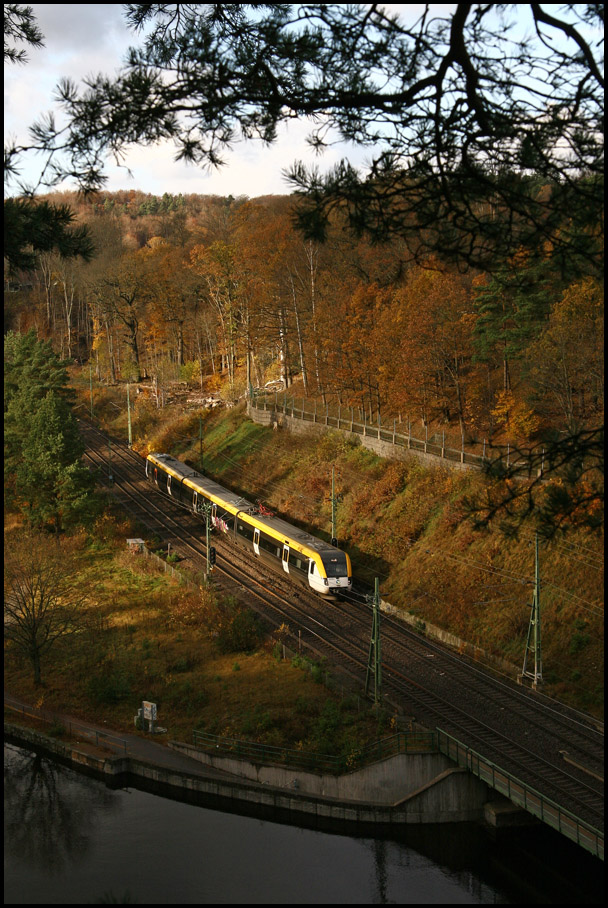 Ett regionaltåg från Göteborg C till Nässjö C passerar Jonsered.